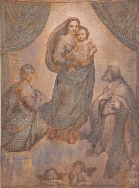 Druckplatte der Sixtinischen Madonna, Joseph von Keller, Original im Linzer Rathaus